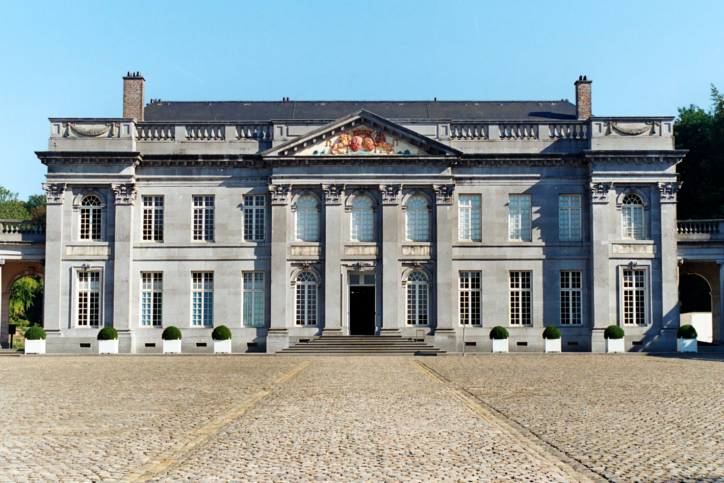 Belgique - Wallonie - Château de Seneffe